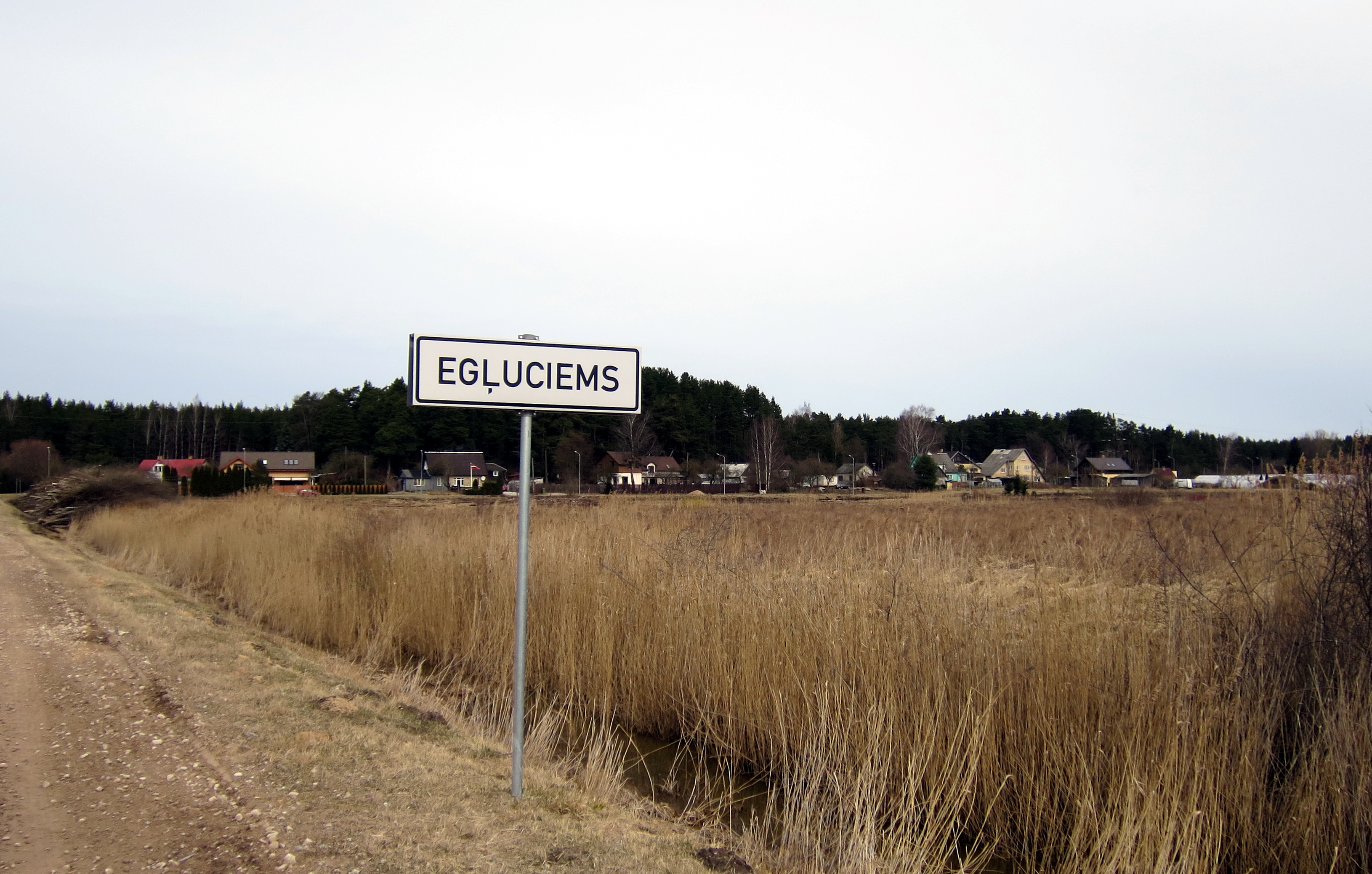 Egļuciems.